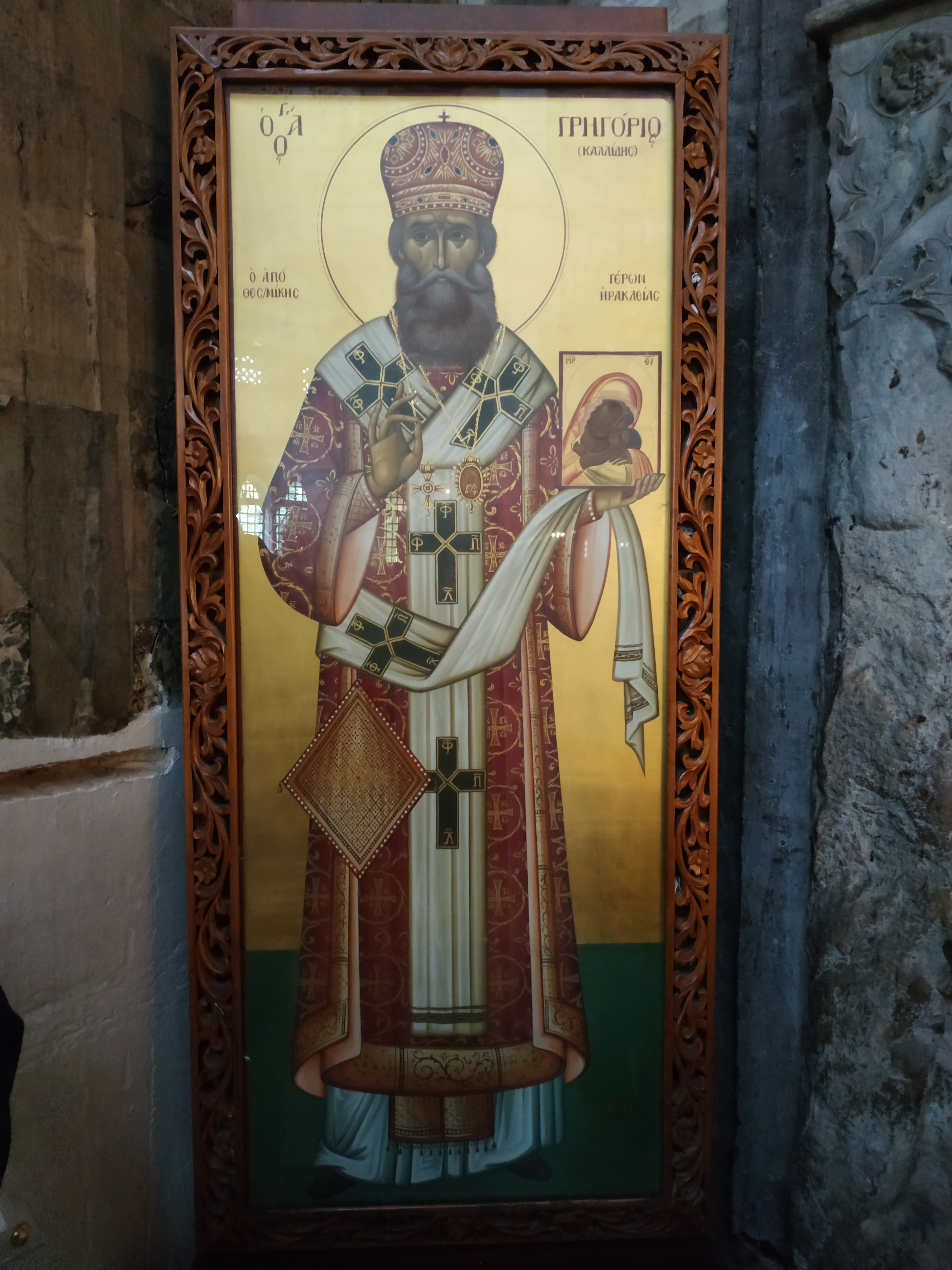 Ікона святого Григорія Калідіса. Фесалоніки